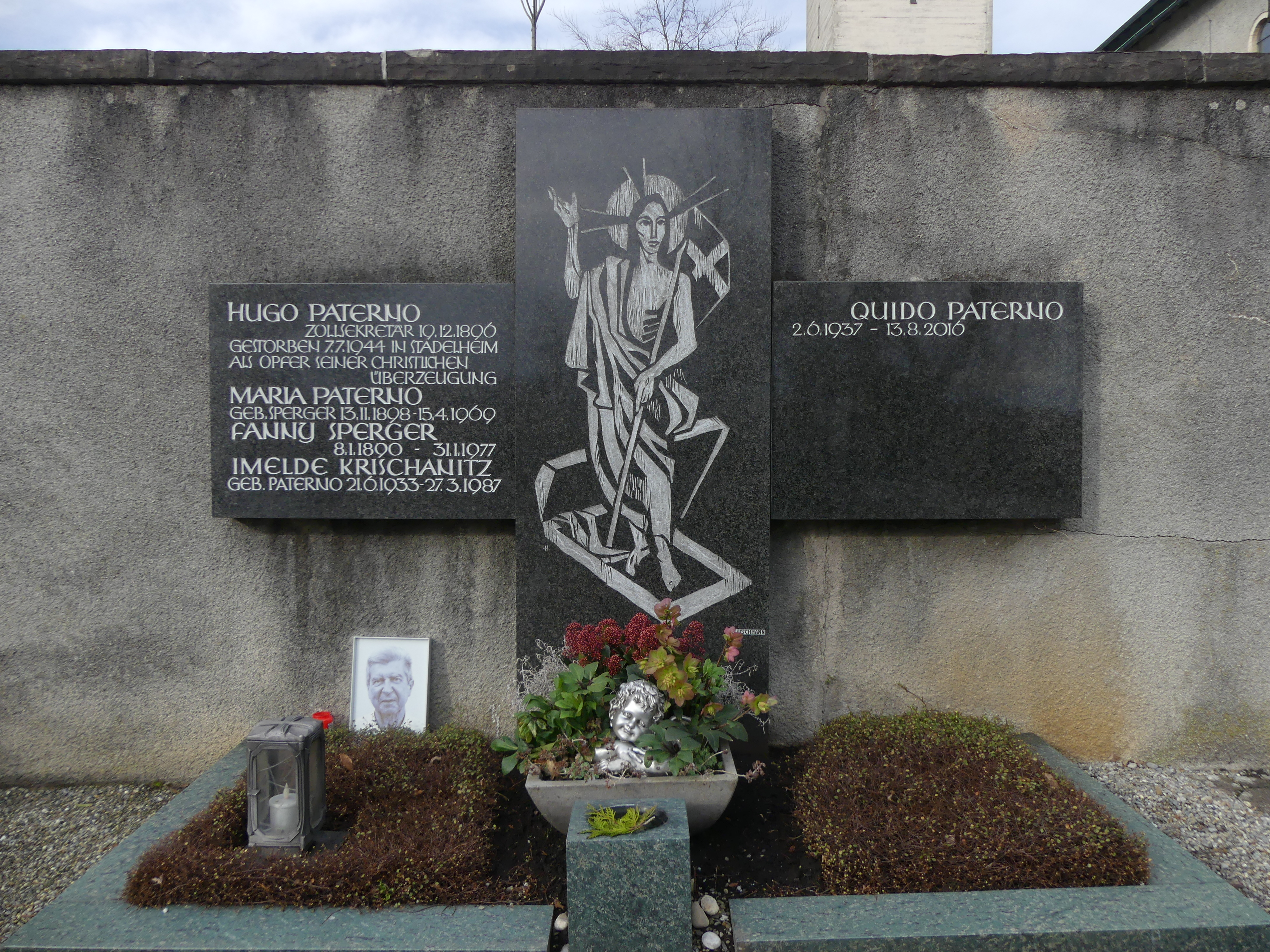 Das Familiengrab des NS-Opfers Hugo Paterno befindet sich im Friedhof der Erlöserkirche in Lustenau.